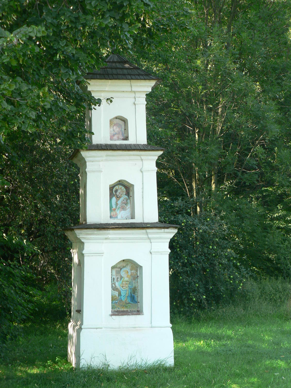 Boží muka (Skotnice), po pravé straně cesty z Mošnova do Příboru, Skotnice